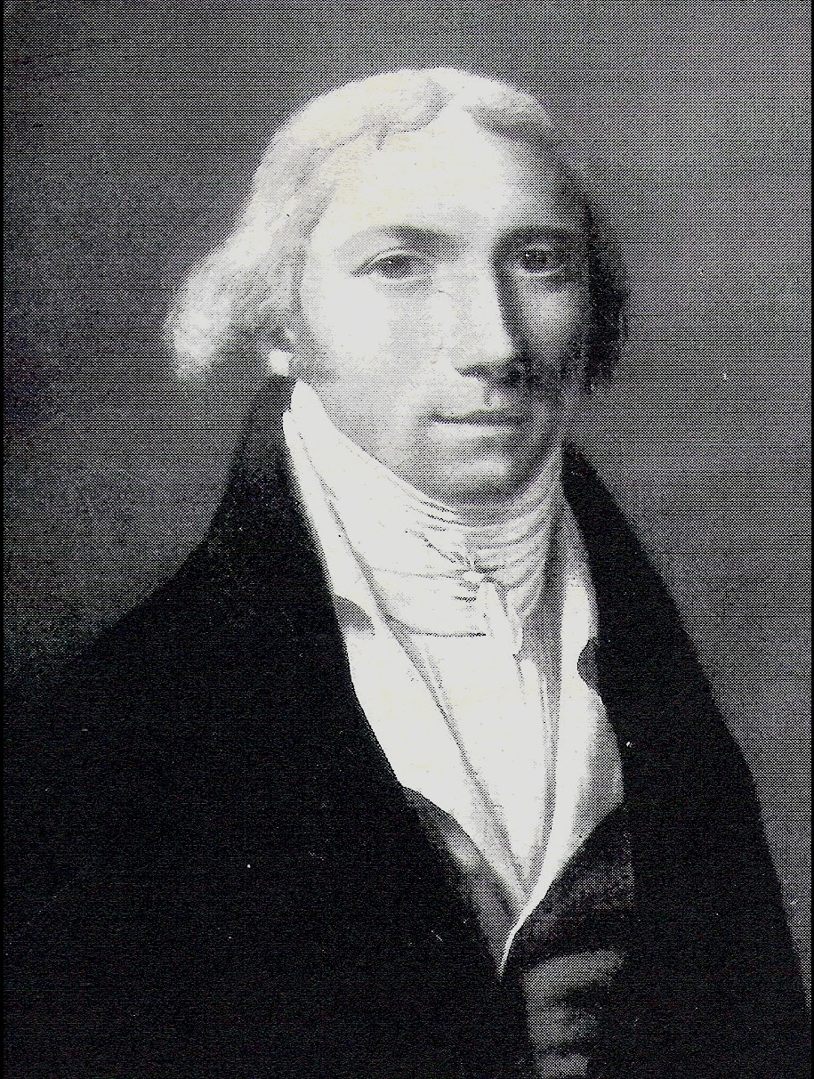 Ausschnitt (schwarz-weiß) aus einem Ölgemälde, Porträt des Juristen und Diplomaten Wolfgang, Christian, Carl, Ludwig Freiherr von Goldner, Offenbach (Minister im Fürstentum Isenburg)